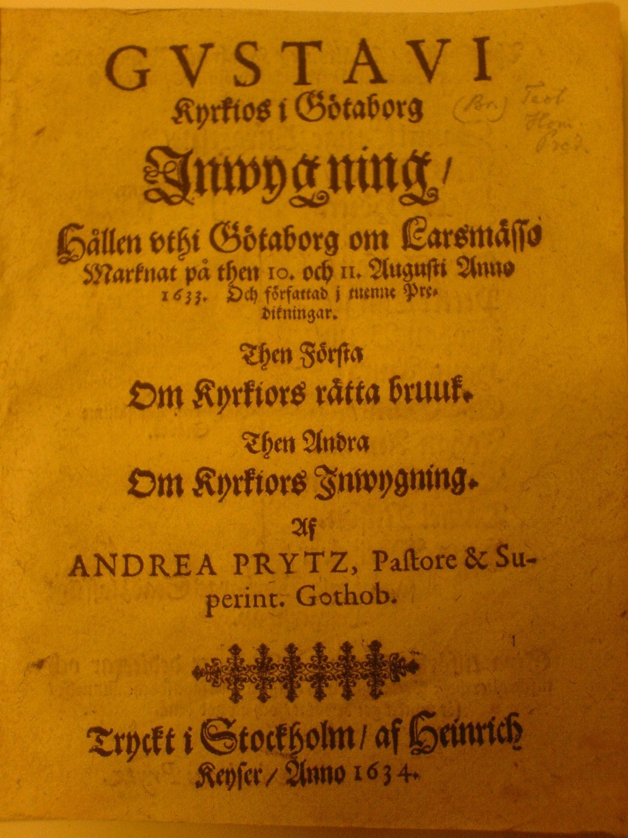 Superintendent Prytz predikan vid invigningen av Gustavi domkyrka